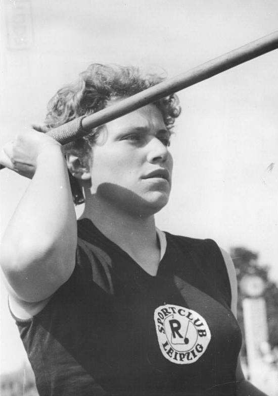 Irmgard Müller Zentralbild Wlocka 24.7.1956 DDR-Leichtathletik-Meisterschaften in Erfurt In der Zeit vom 20. bis zum 22. Juli 1956 wurden im Erfurter Georg-Dimitroff-Stadion die VII. Leichtathletik-Meisterschaften der DDR ausgetragen. UBz: Im Speerwerfen der Damen siegte Irmgard Müller (Rotation Leipzig) mit einer Weite von 44,89 m